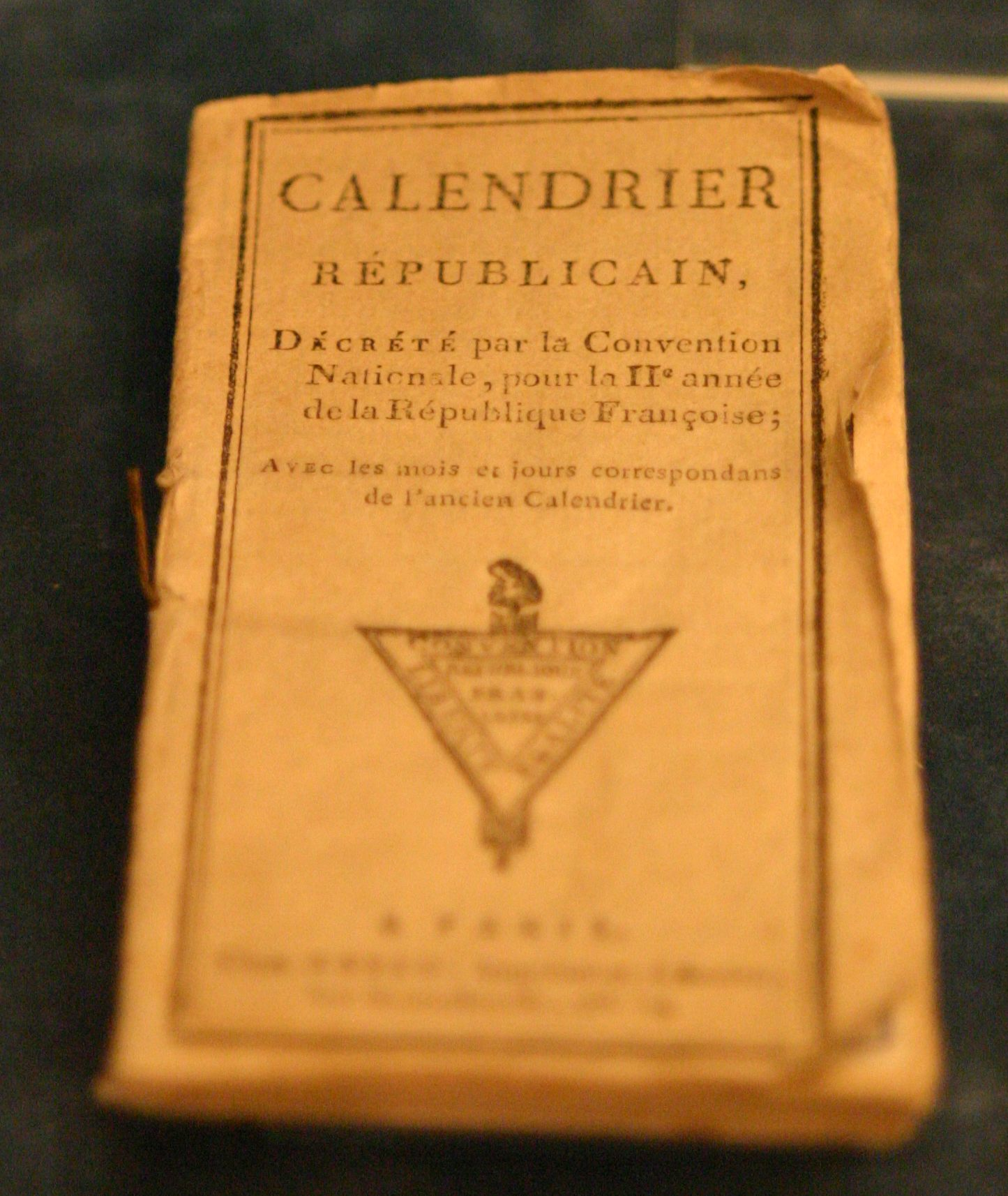 CALENDRIER RÉPUBLICAIN, DÉCRÉTÉ par la Convention Nationale, pour la IIe année de la République Françoise; AVEC les mois et jours correspondans de l'ancien Calendrier